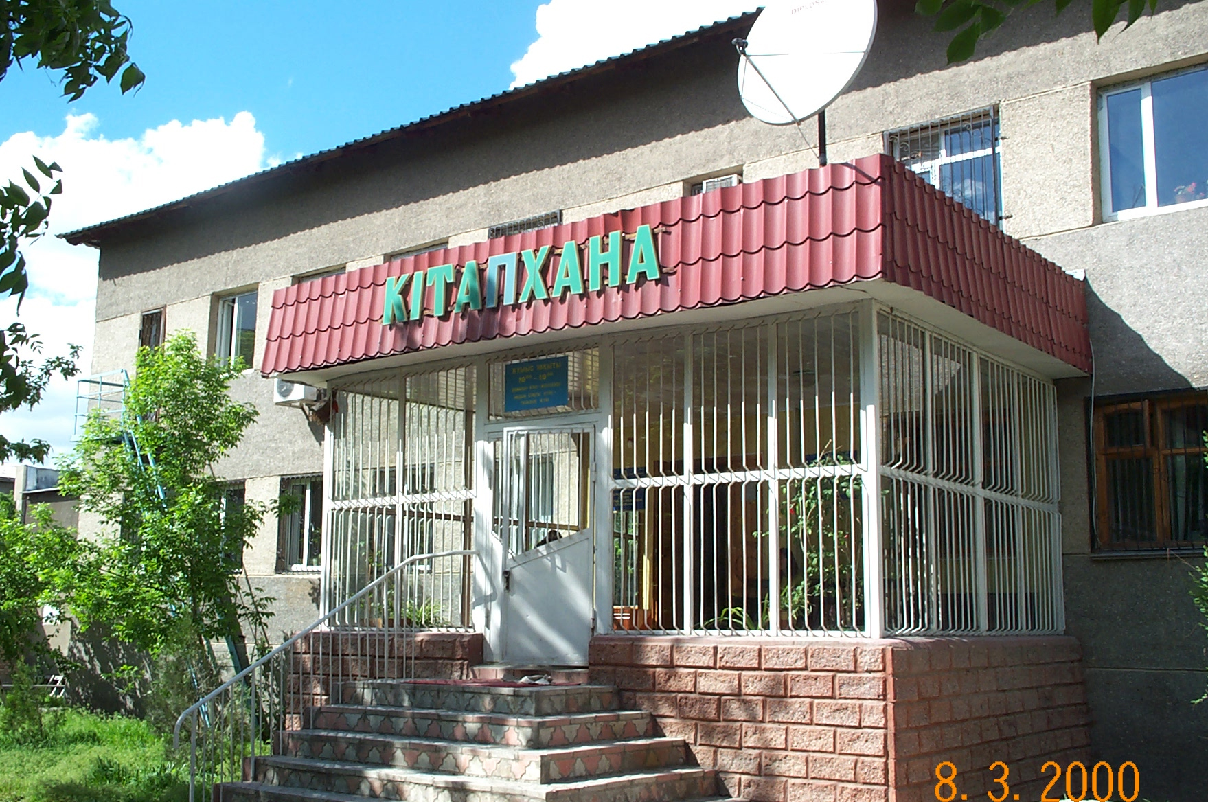 Ы. Алтынсарин атындағы Оңтүстік Қазақстан облыстық балалар кітапханасы